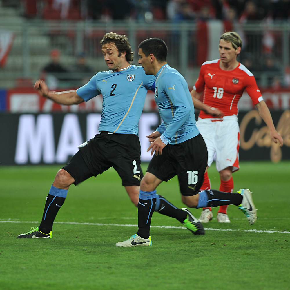 Freundschaftliches Länderspiel Österreich - Uruguay am 5. März 2014 in Klagenfurt: Diego Lugano